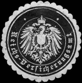 Sealing stamp Title: Reichs - Versicherungsamt Description: schwarz, weiß, geprägt Place: size: 4 cm